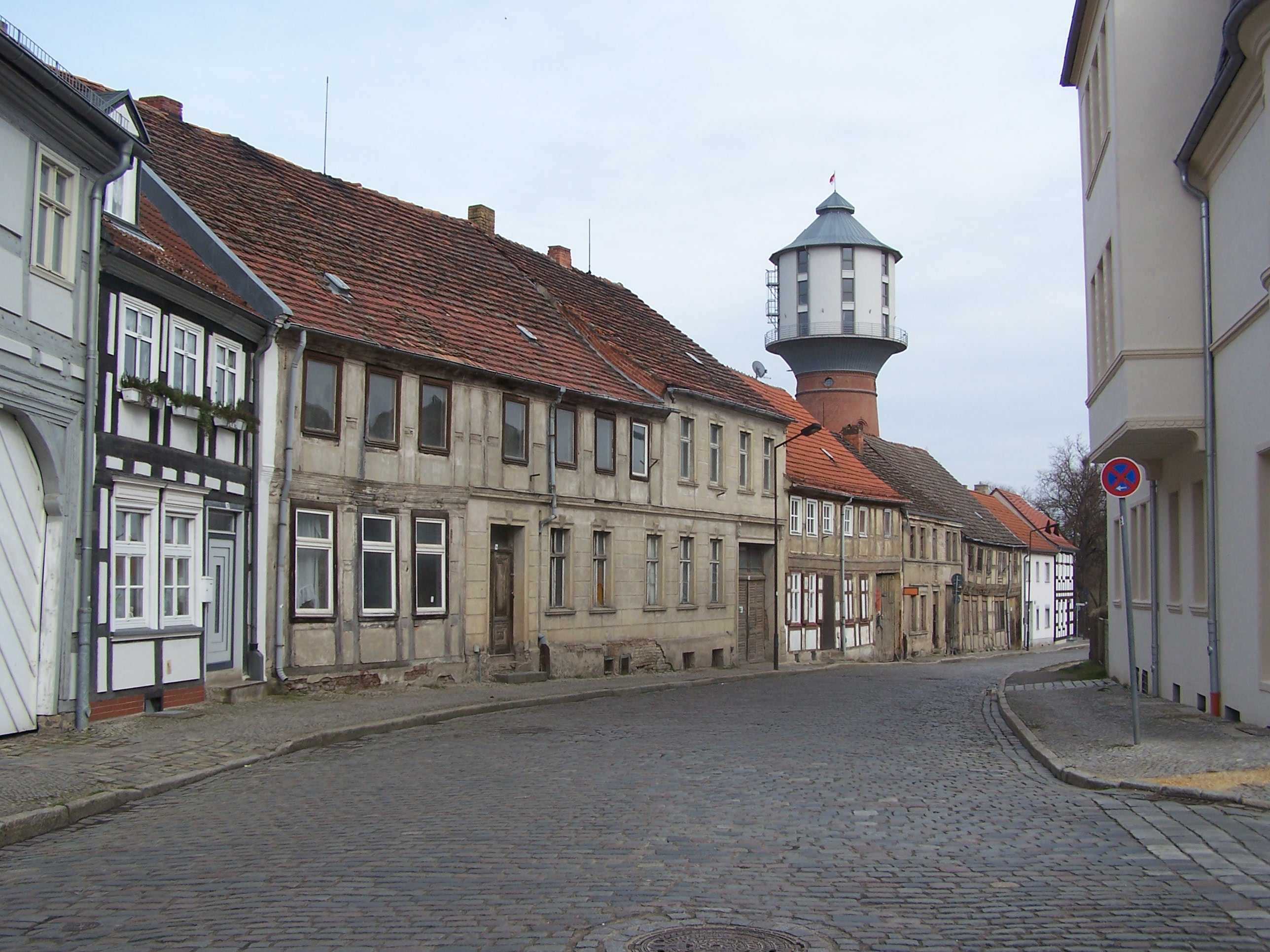 Altstadt von Nauen, Goethestraße, im Hintergrund der Wasserturm